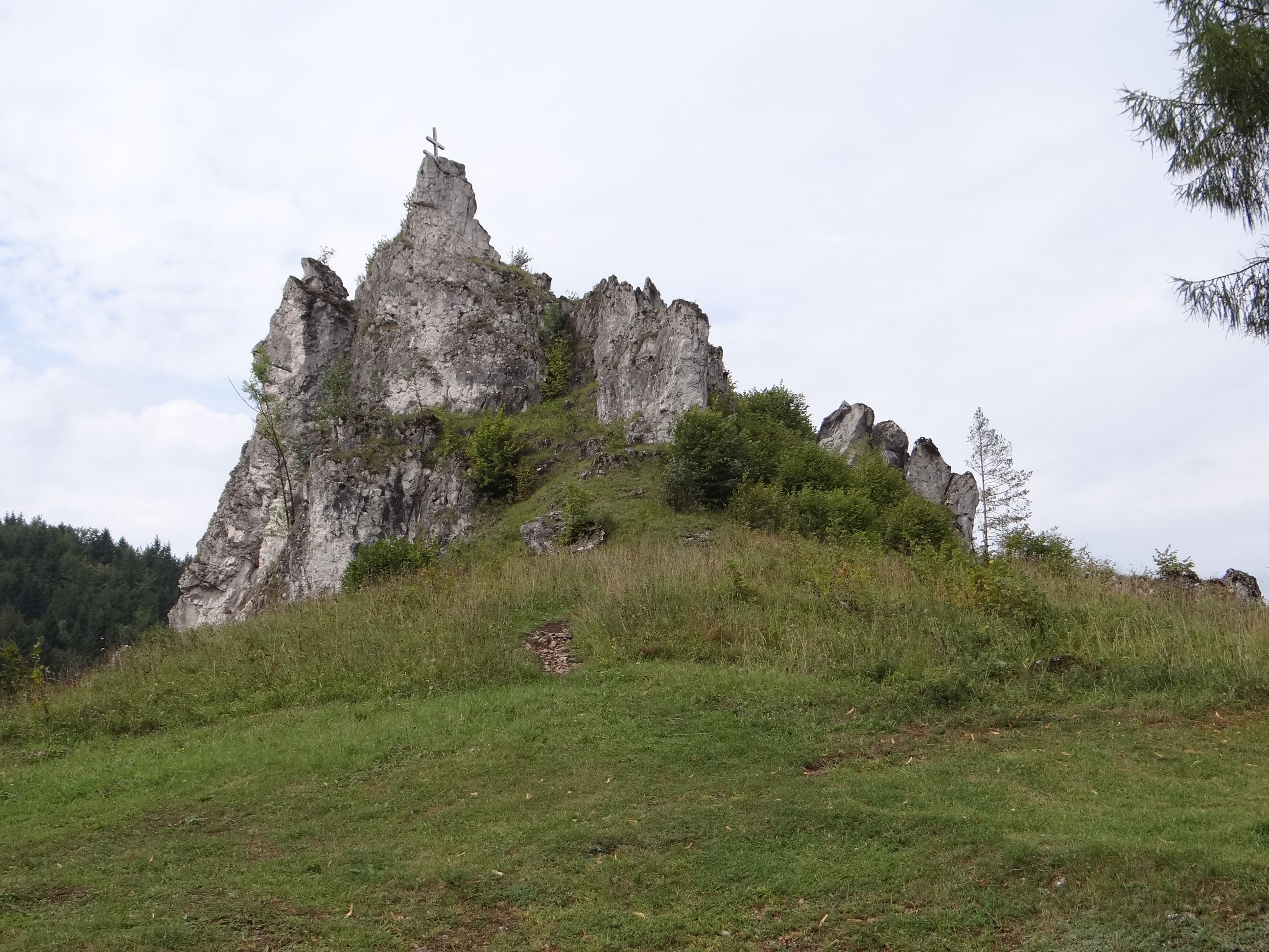 Studničná, część wsi Komjatná. skały we wsi